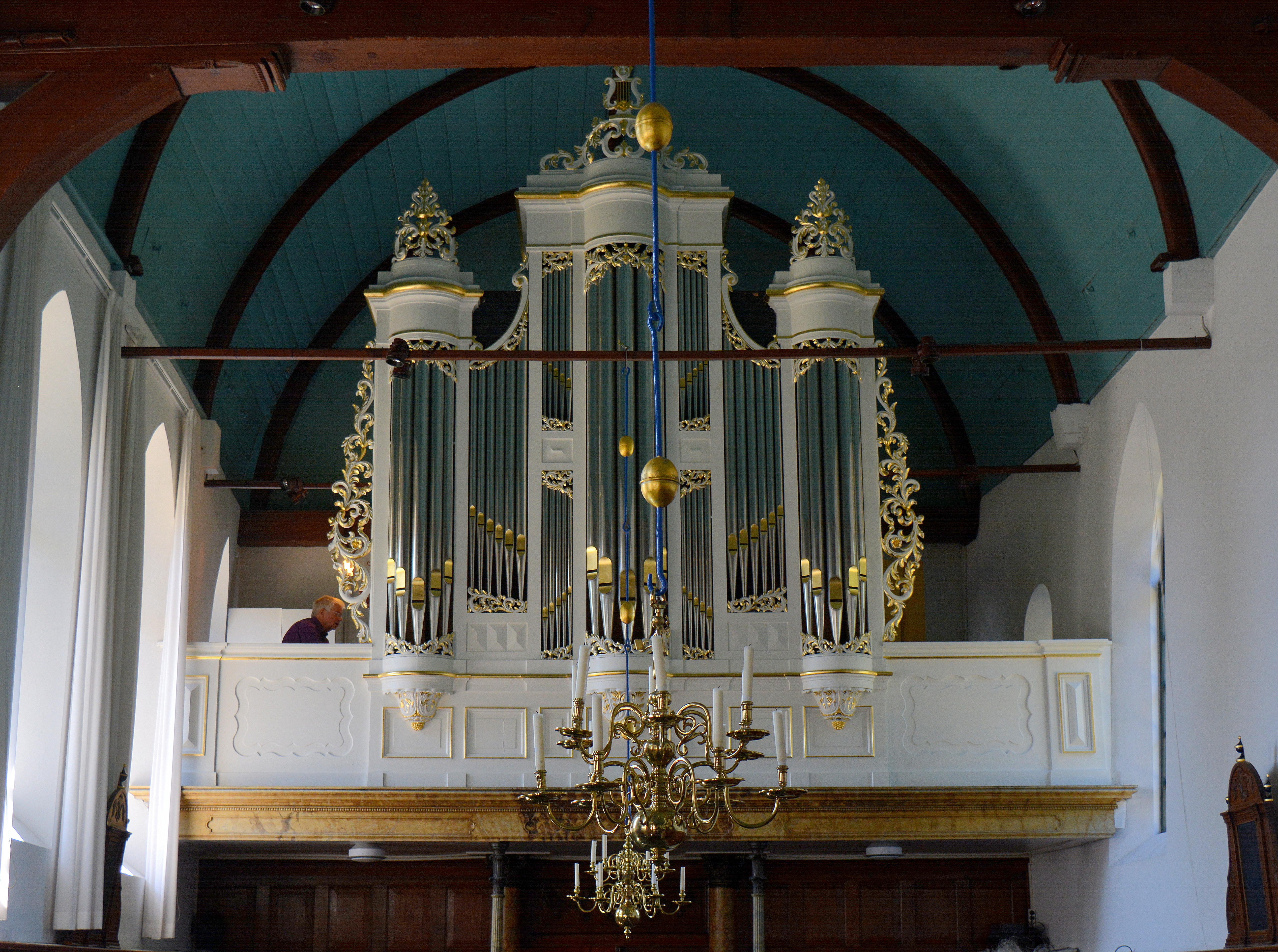 Easterlittens, herfoarme tsjerke, oargel Willem Hardorff